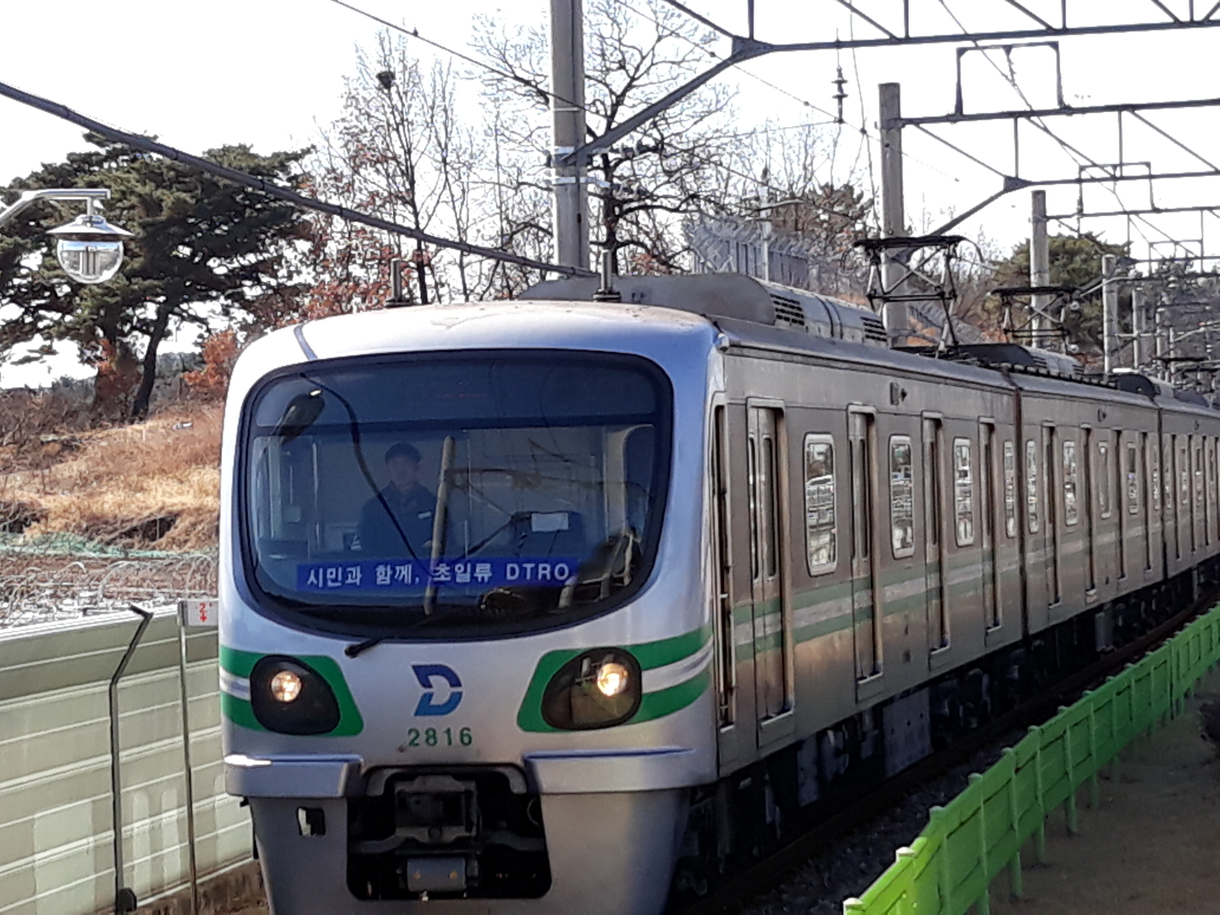 회차하여 문양역으로 들어오는 대구 도시철도 2호선 216편성 영남대행 열차